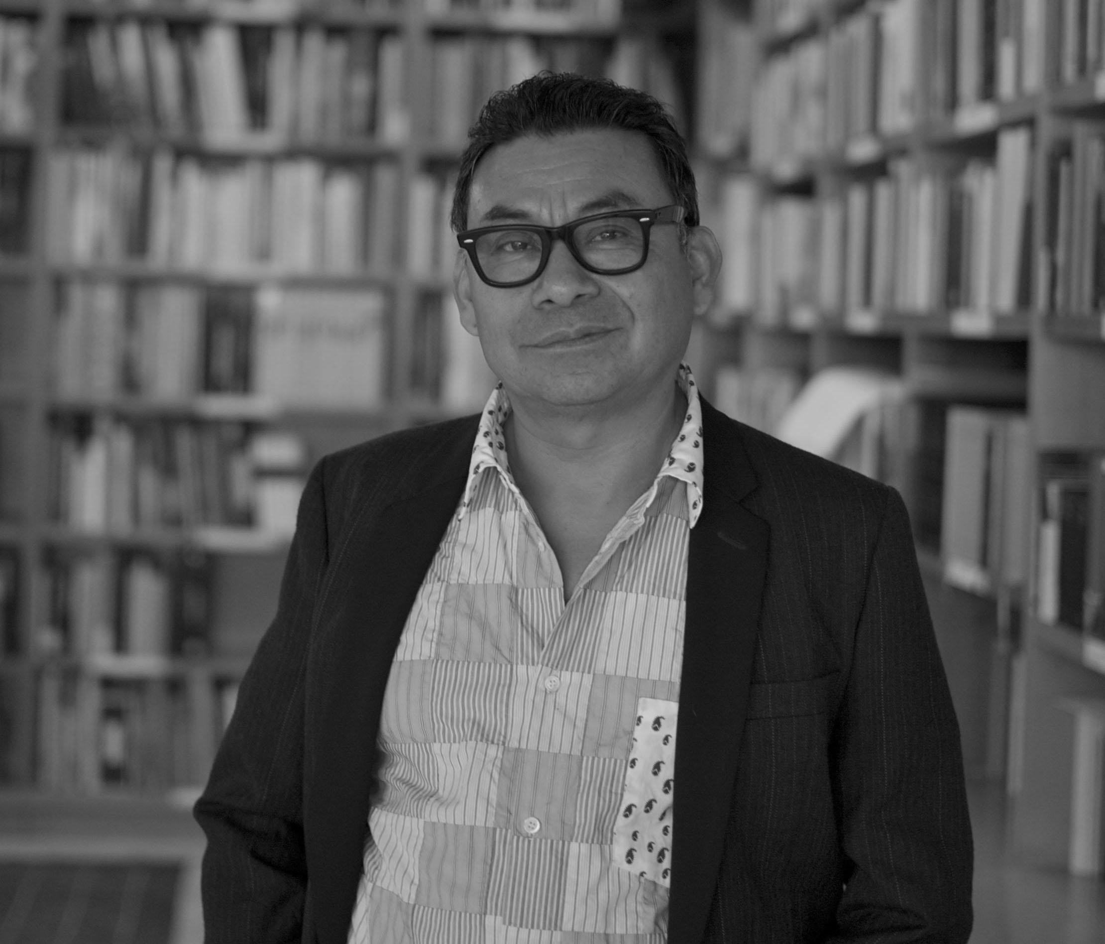 Sergio Hernández